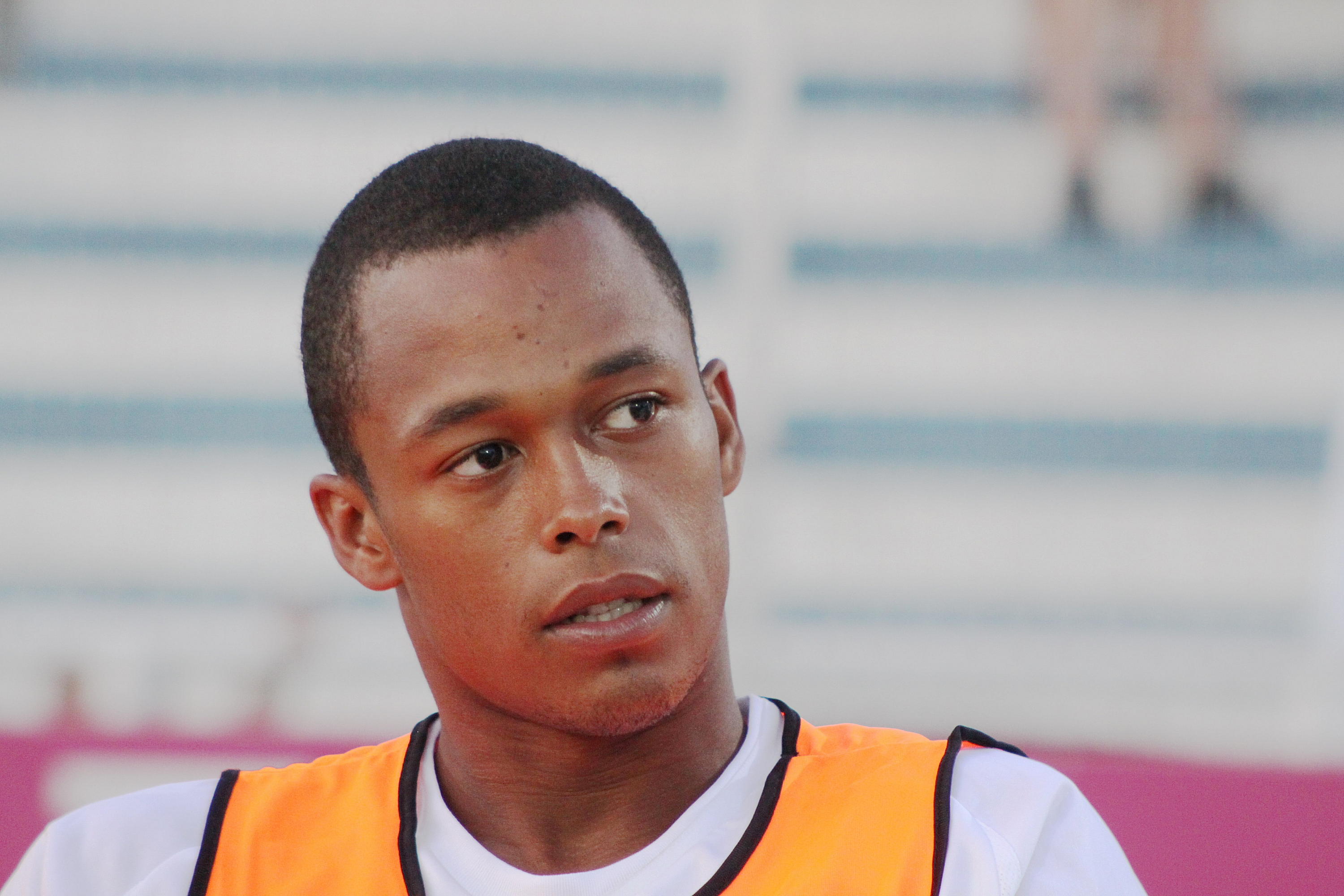 Fabiano Santacroce - SSC Neapel (2) Fabiano Santacroce - Società Sportiva Calcio Napoli